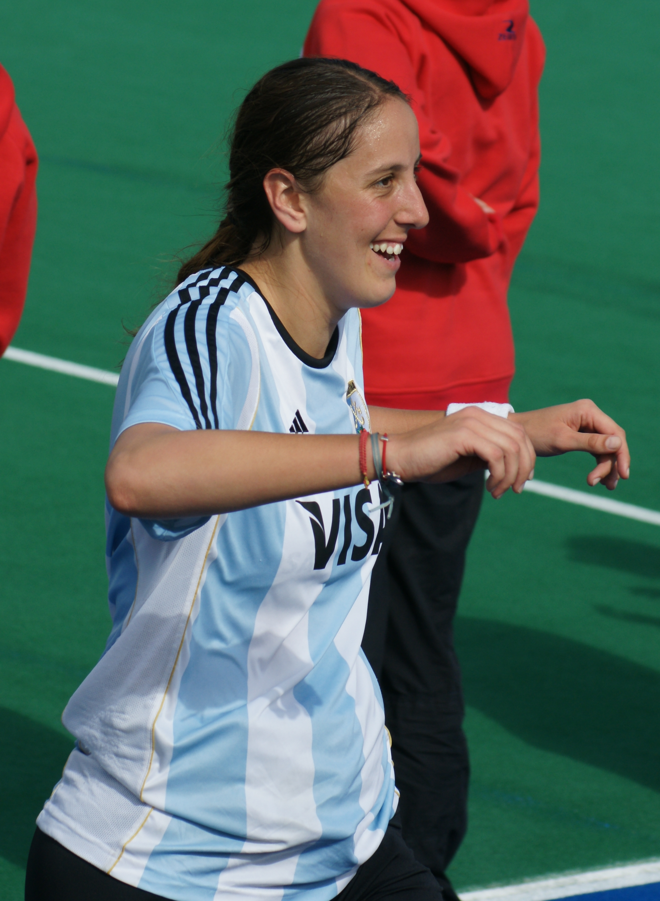 Belén Succi